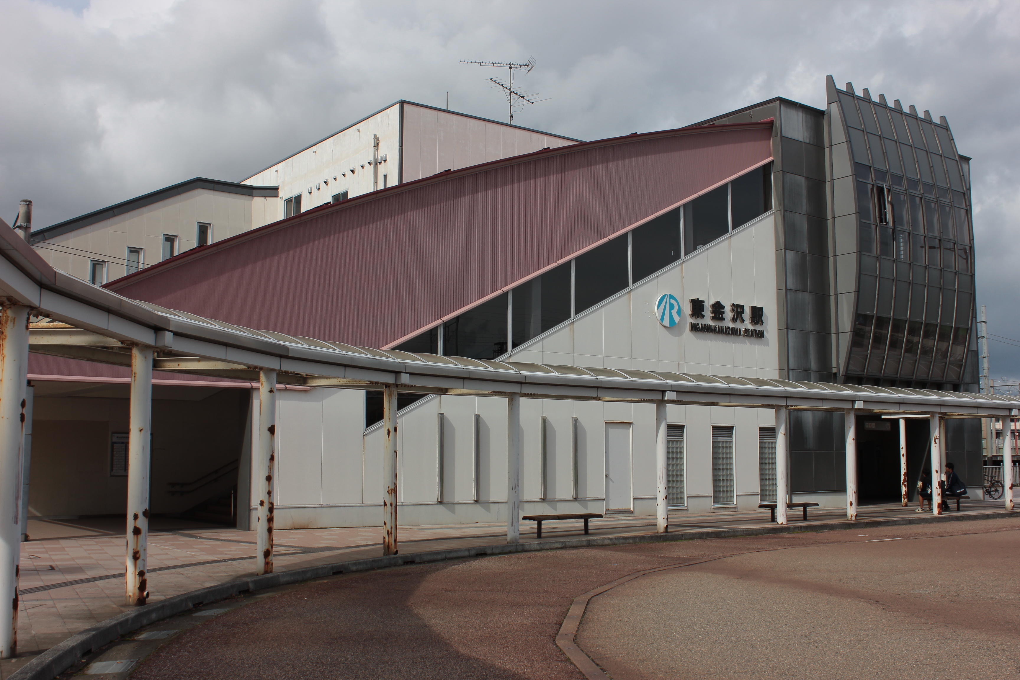 東金沢駅（石川県金沢市、2019年撮影） Canon EOS Kiss X5